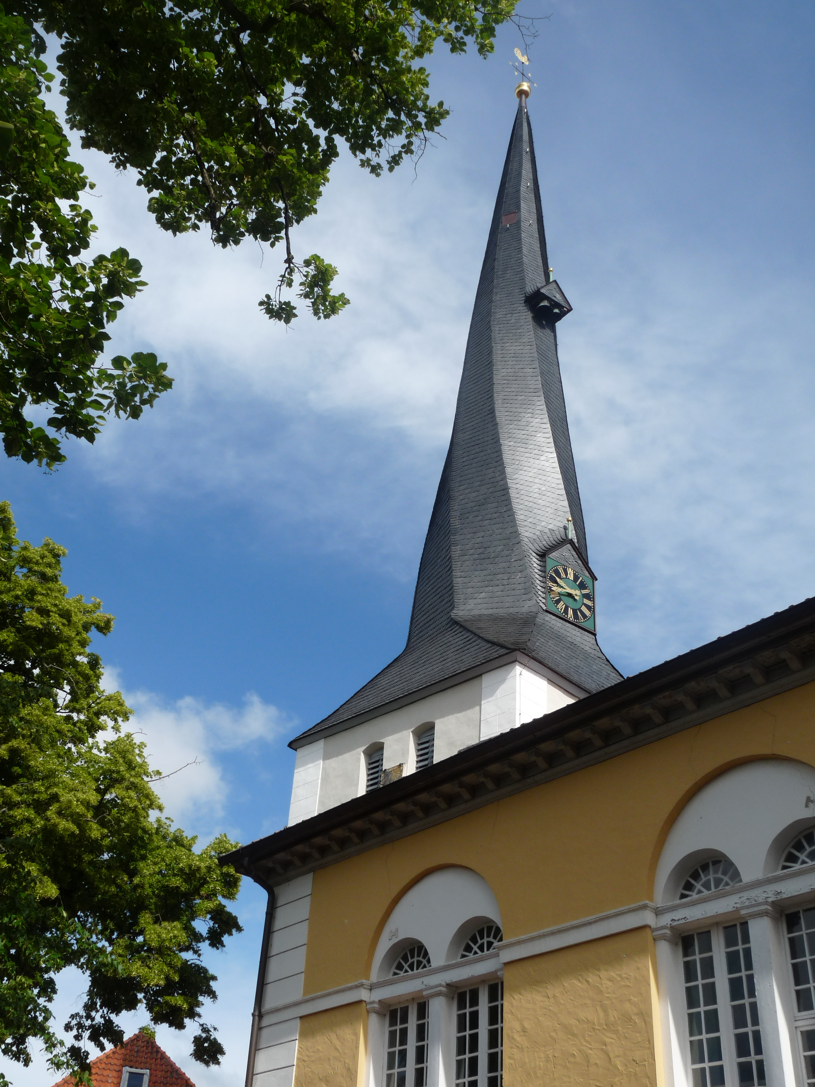 Clocher tors de l'église protestante St. Jacobi de Solzenau (Basse-Saxe), photo prise lors d'un voyage en Allemagne en juin 2011.